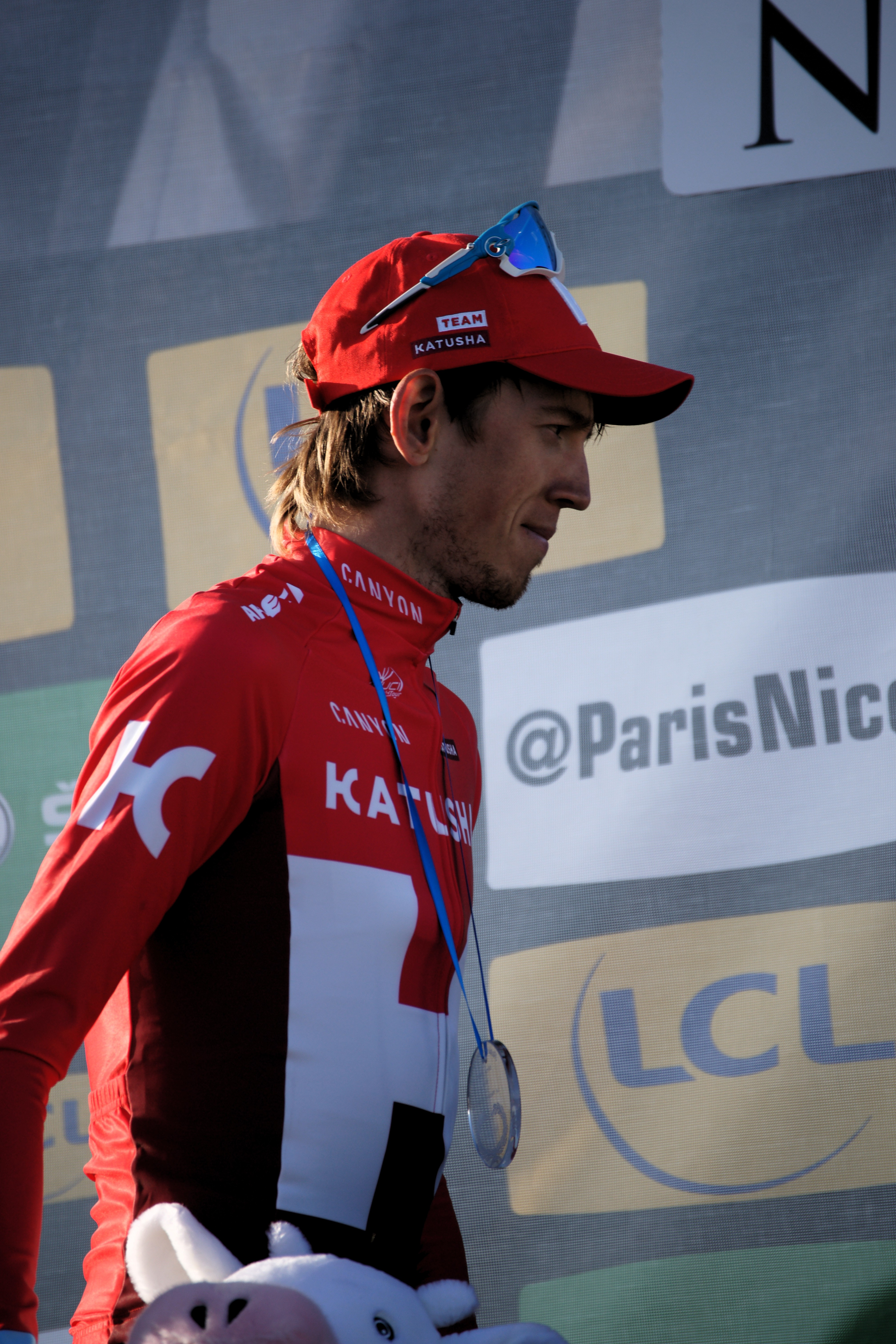 Ilnur Zakarin Madone d'Utelle 2016 Depicted person: Ilnur Zakarin Depicted team: Katusha